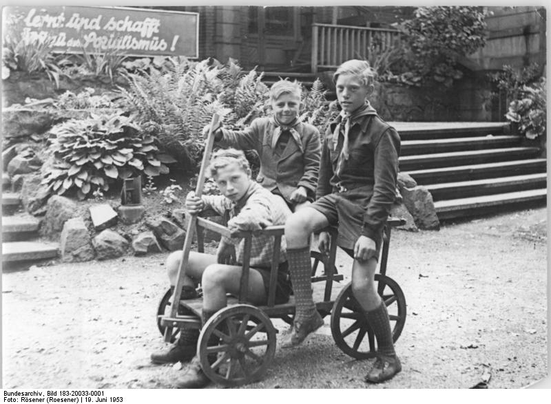 Zentralbild Rösener 19.6.1953 Fleißige Buntmetallsammler. Die Schüler der I. Hilfsschule in Buckau, die Pioniere Jörg Bethke, Willfried Haass und Manfred Dörner aus der Klasse 6b haben im Laufe des Jahres 20 1/2 Zentner Buntmetall gesammelt. UBz: Die drei Schüler der I. Hilfsschule, mit ihrem Leiterwagen.